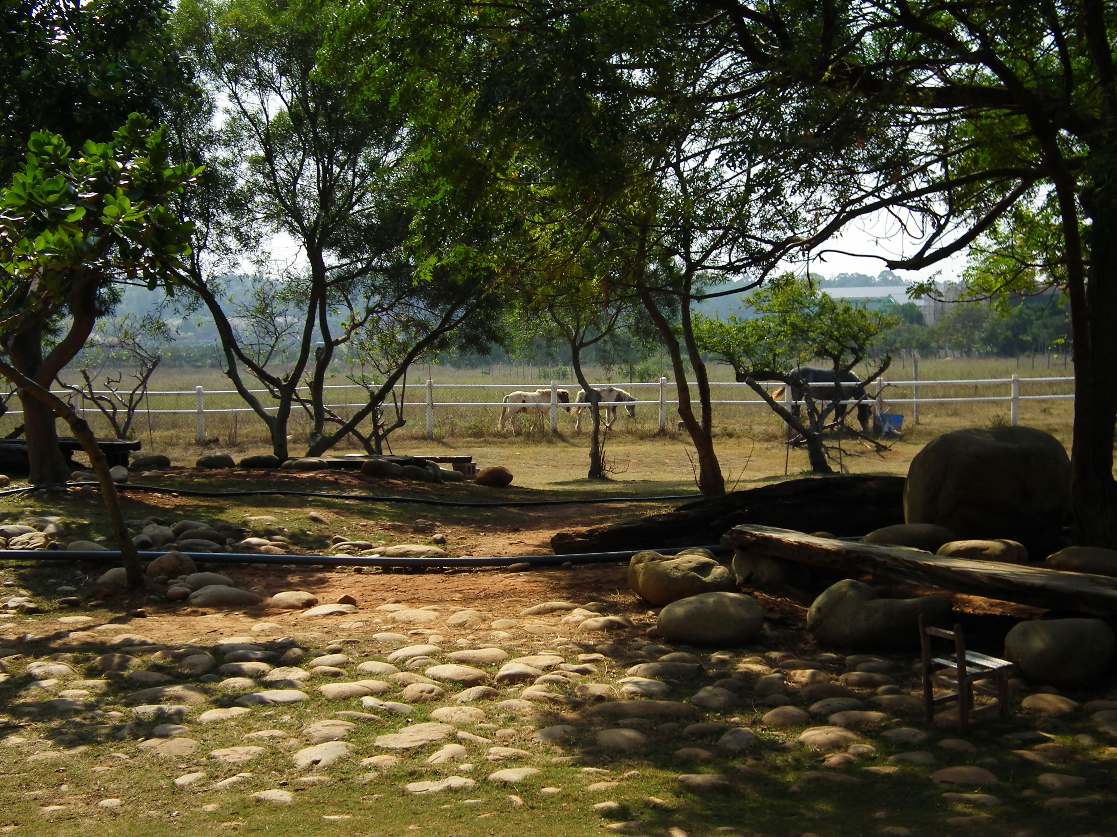 Pegasus Ranch 天馬牧場